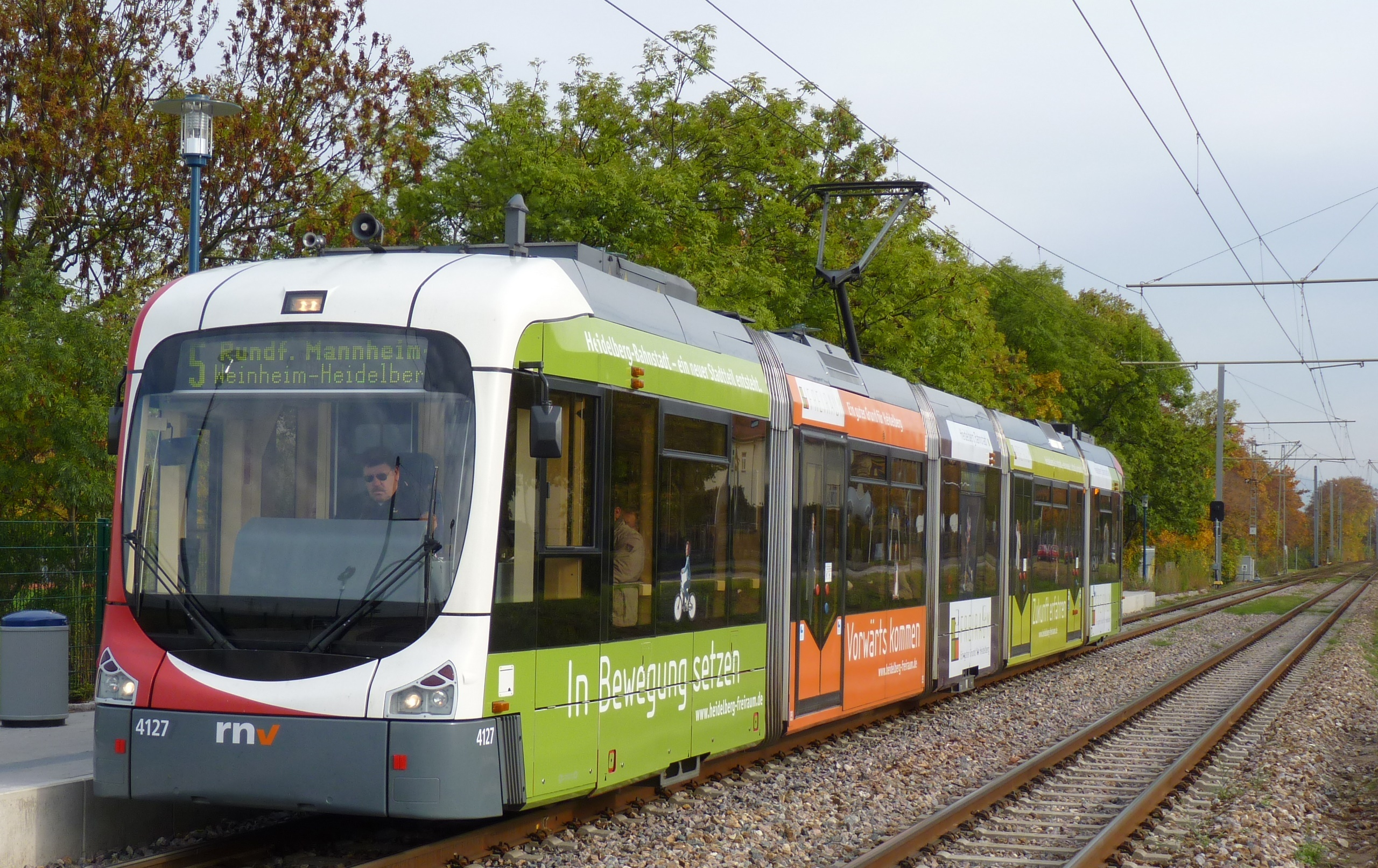 Streetcar Straßenbahn Tram Mannheim RNV Rhein-Neckar-Verbund